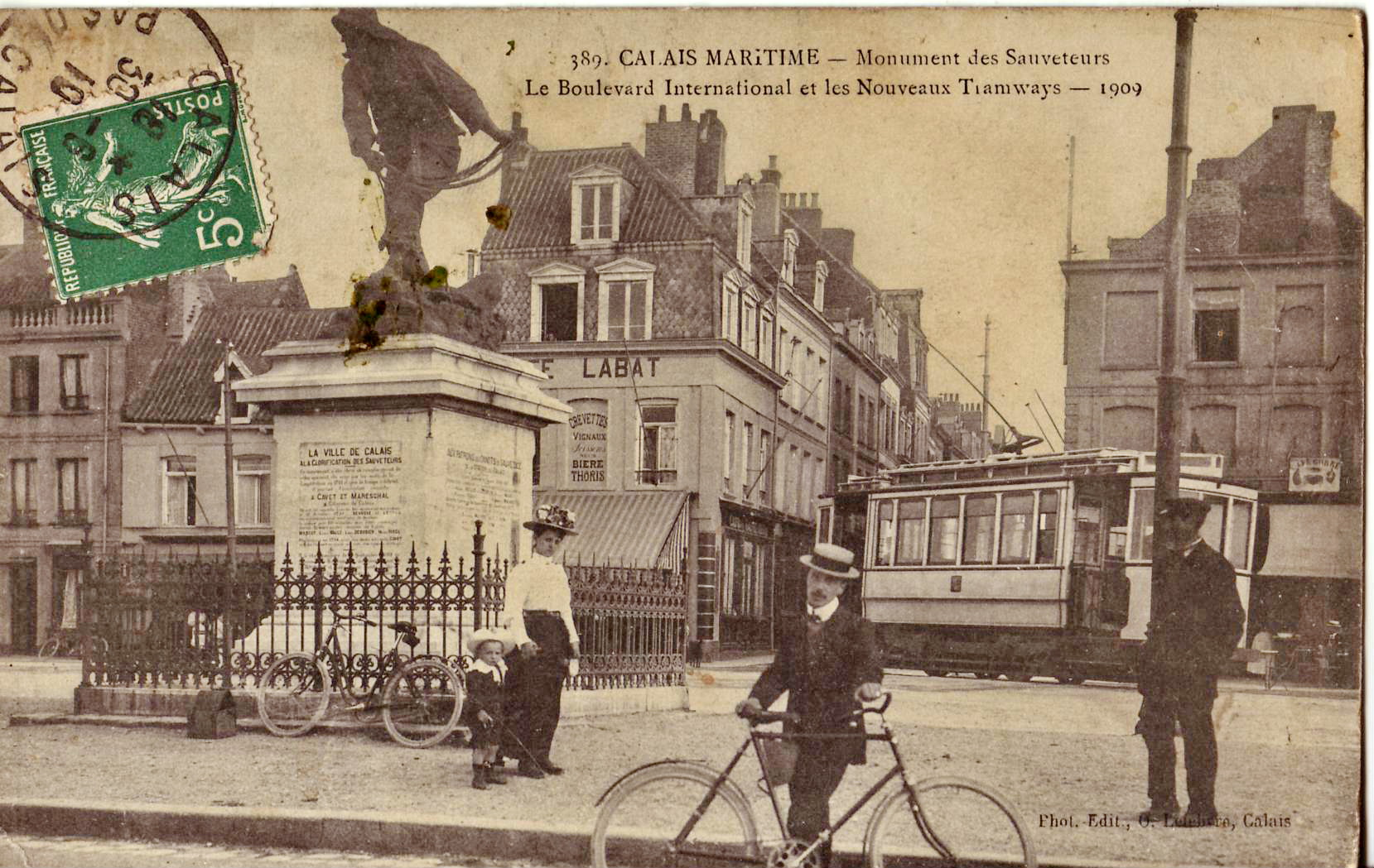 Carte postale ancienne éditée par O. Lefebvre à Calais, n°389 : CALAIS MARITIME - Monument des Sauveteurs - Le Boulevard International et les Nouveaux Tramways - 1909